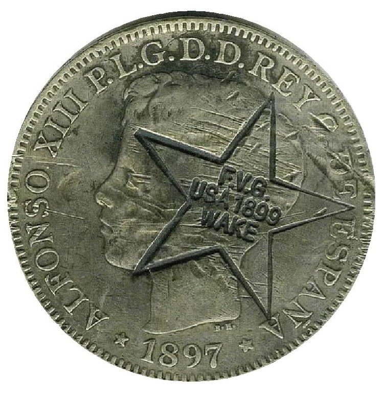 Isla Wake moneda española con resello conmemorativo de la ocupación EEUU.